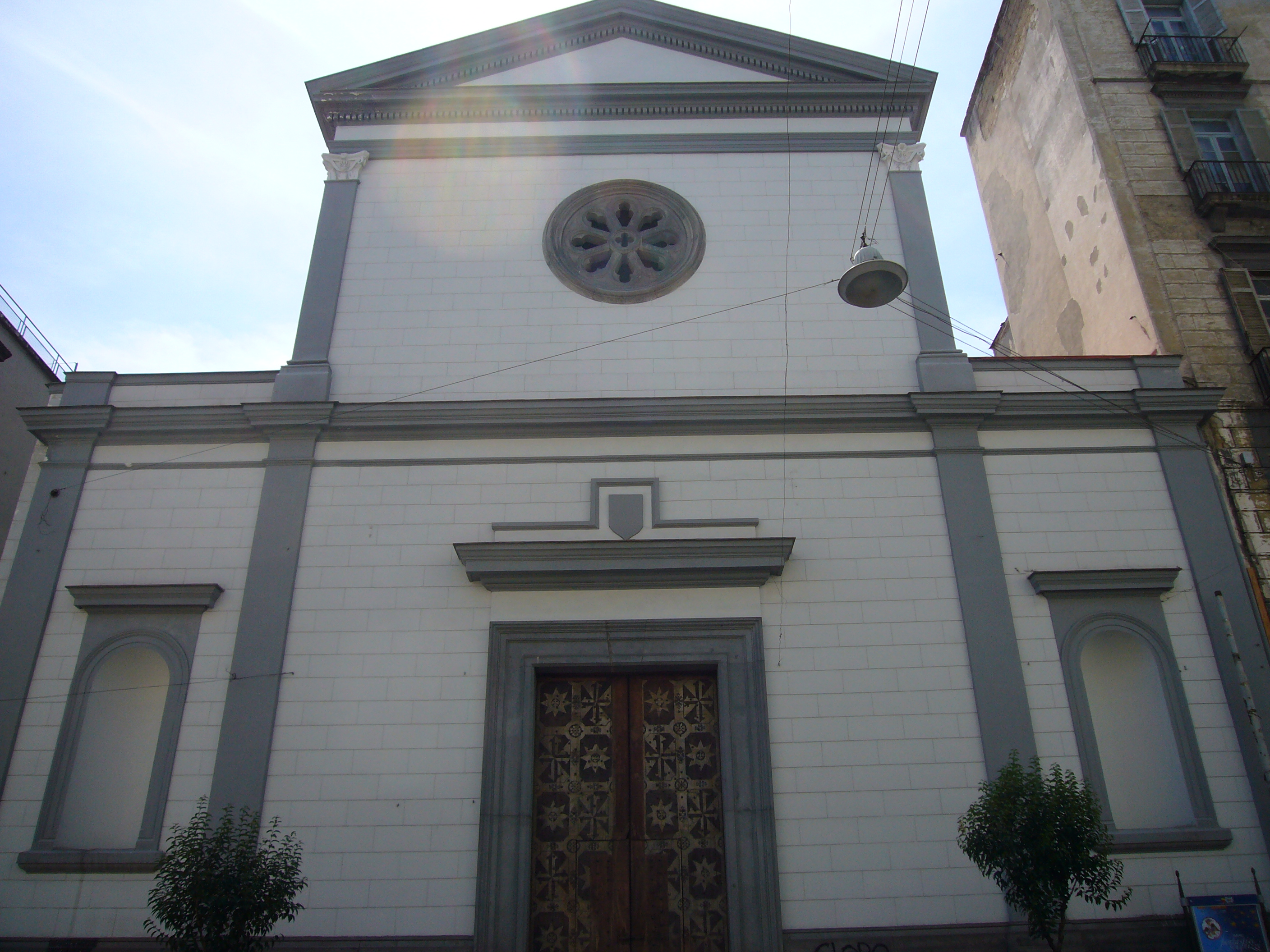 Napoli, via Duomo: Chiesa di San Severo al Pendino